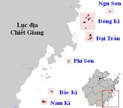 Các đảo do Trung Hoa Dân Quốc nắm giữ ngoài khơi bờ biển đông nam Chiết Giang (1949-1955)